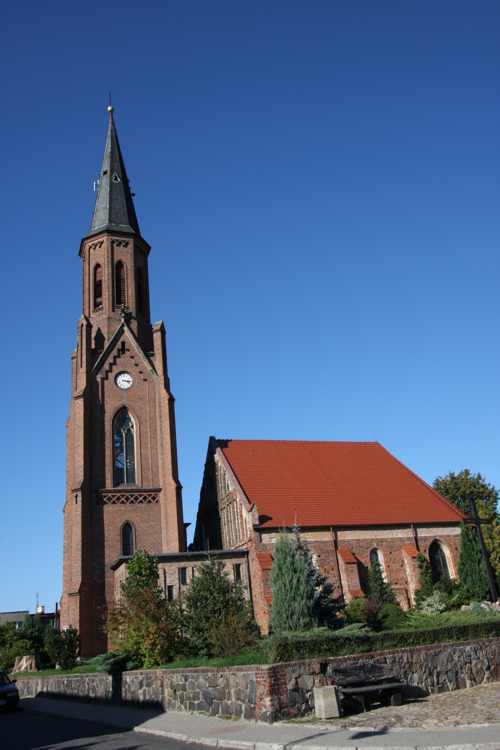 Lubniewice, kościół par. p.w. Matlki Boskiej Różańcowej, mur., 2 poł. XIV, XV, 1882